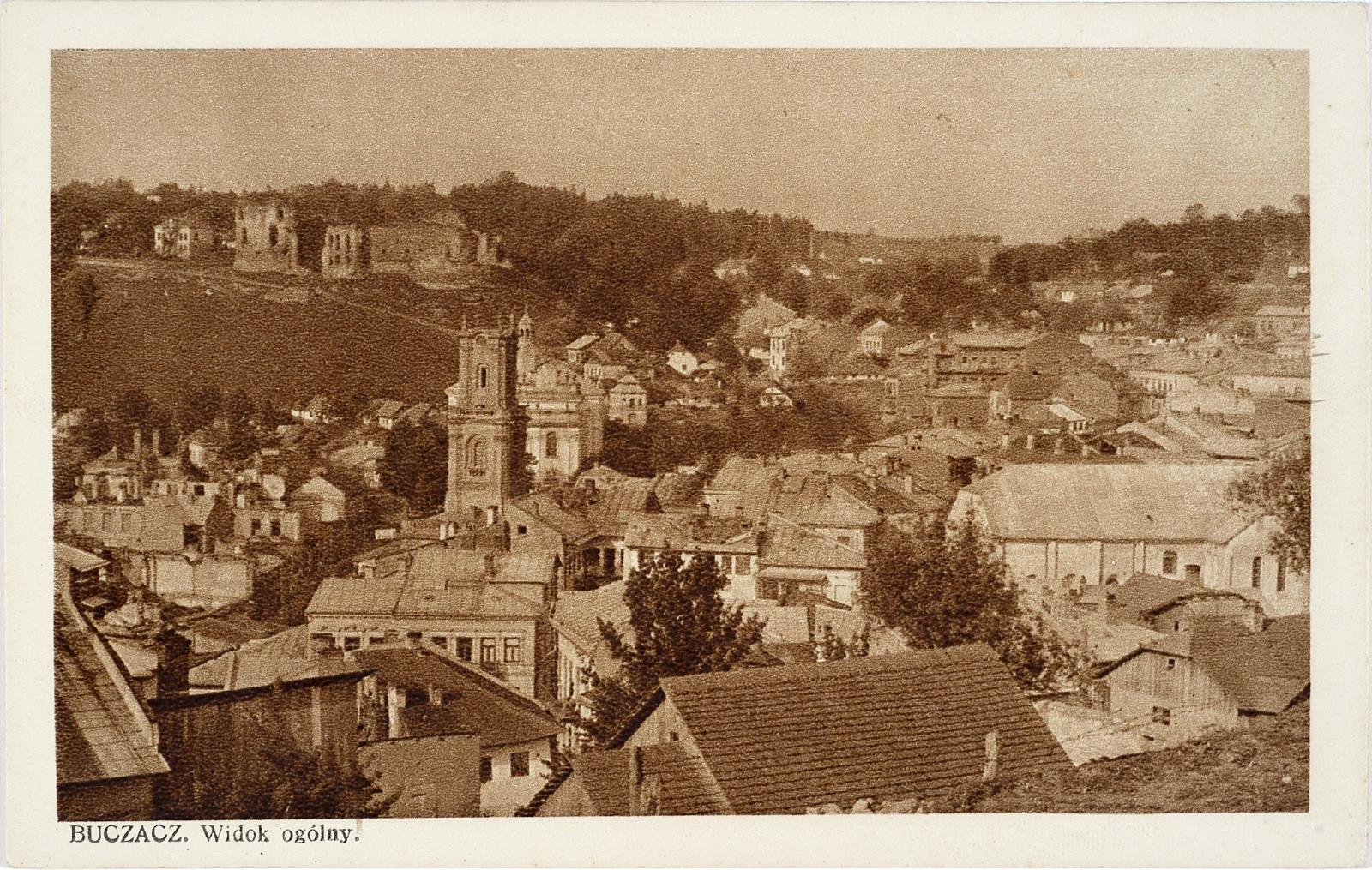 Вигляд на центр Бучача. Справа - Велика синагога.